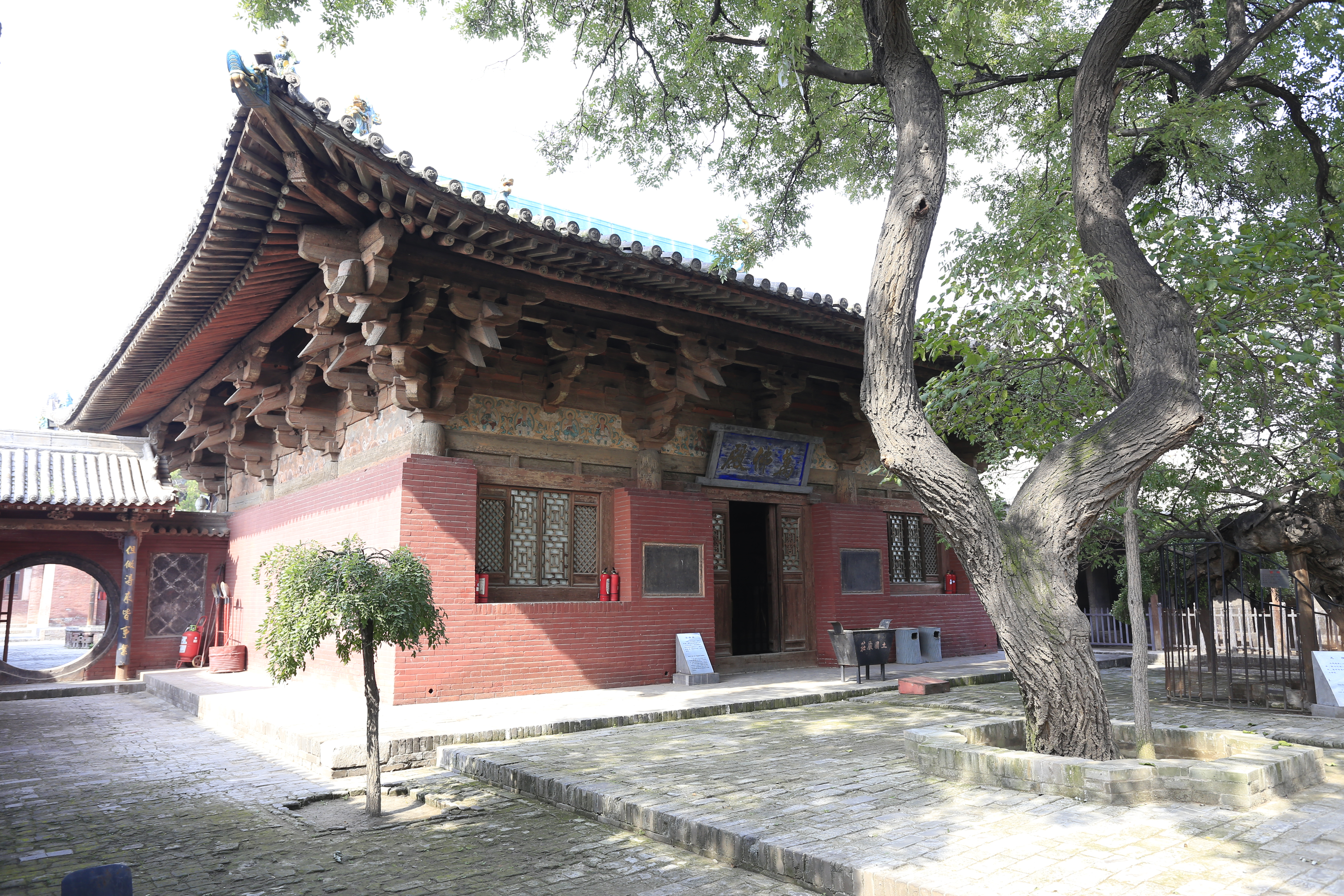 平遥镇国寺 —— 万佛殿